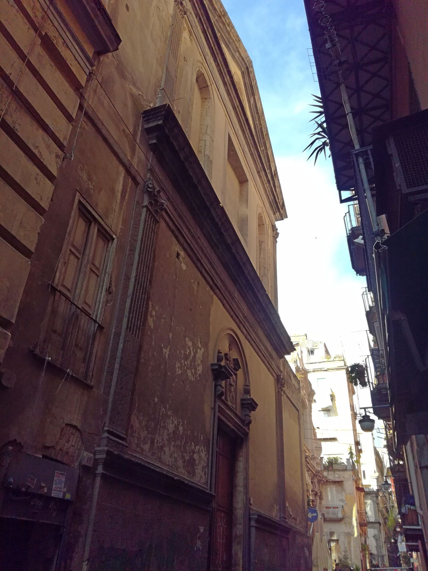 Chiesa di Santa Maria Donnamorita